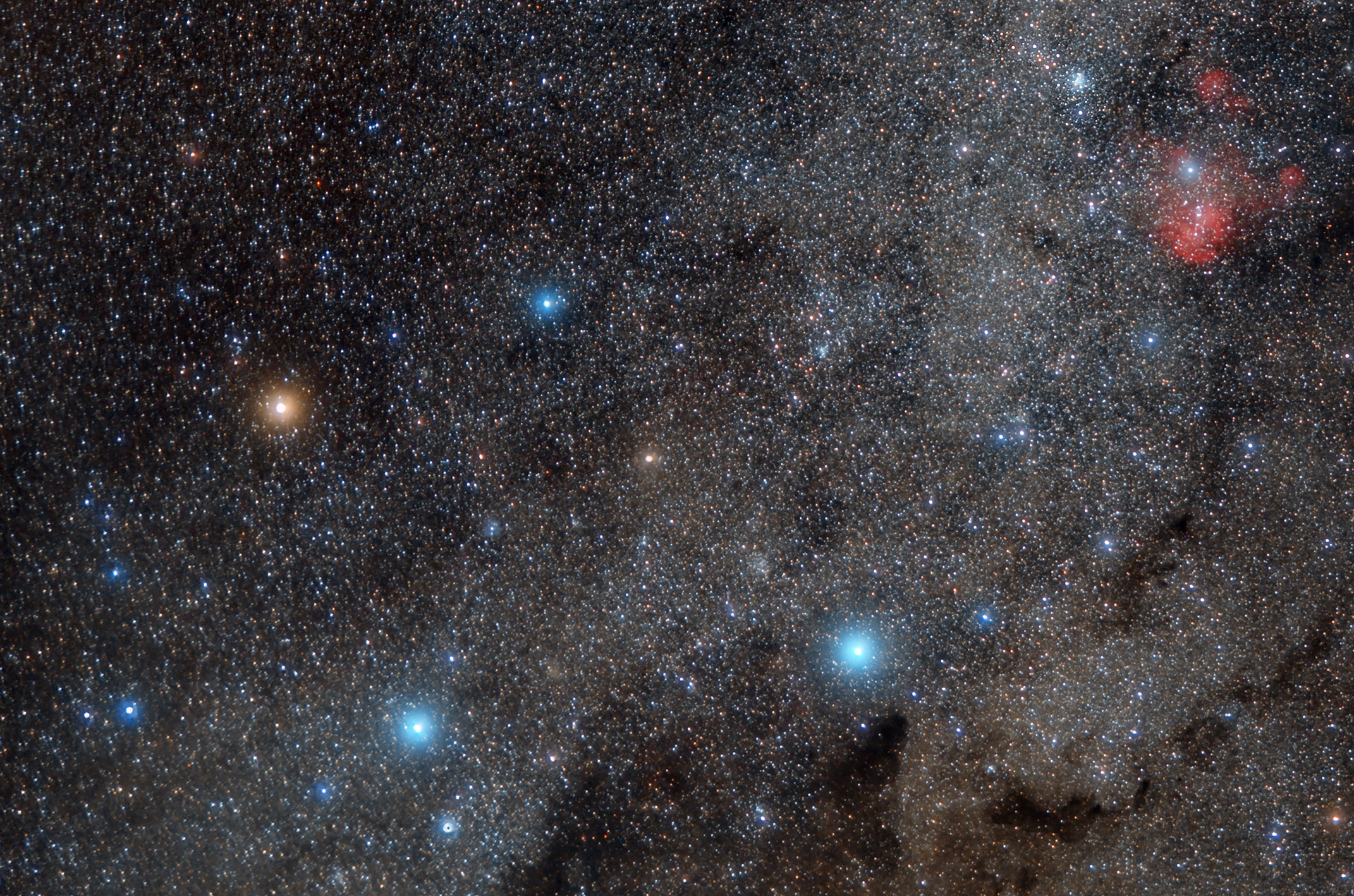 Immagine ottenuta da Papamoa (New Zealand) mediante una Reflex digitale e un obiettivo grandangolare ed un piccolo astro inseguitore per compensare il movimento della rotazione terrestre. Montatura: SkyWatcher Star Adventurer Camera: Canon 60Da su Tamron SP 17-50 mm F/2.8 a 50 mm 2.8 Guida: QHY5L-II-M su Mini Borg ED 45 Pose: N. 19 pose per un totale di 44' La foto è stata ottenuta insieme a Luca Milantoni. Elaborazione digitale a cura di Attilio Bruzzone.